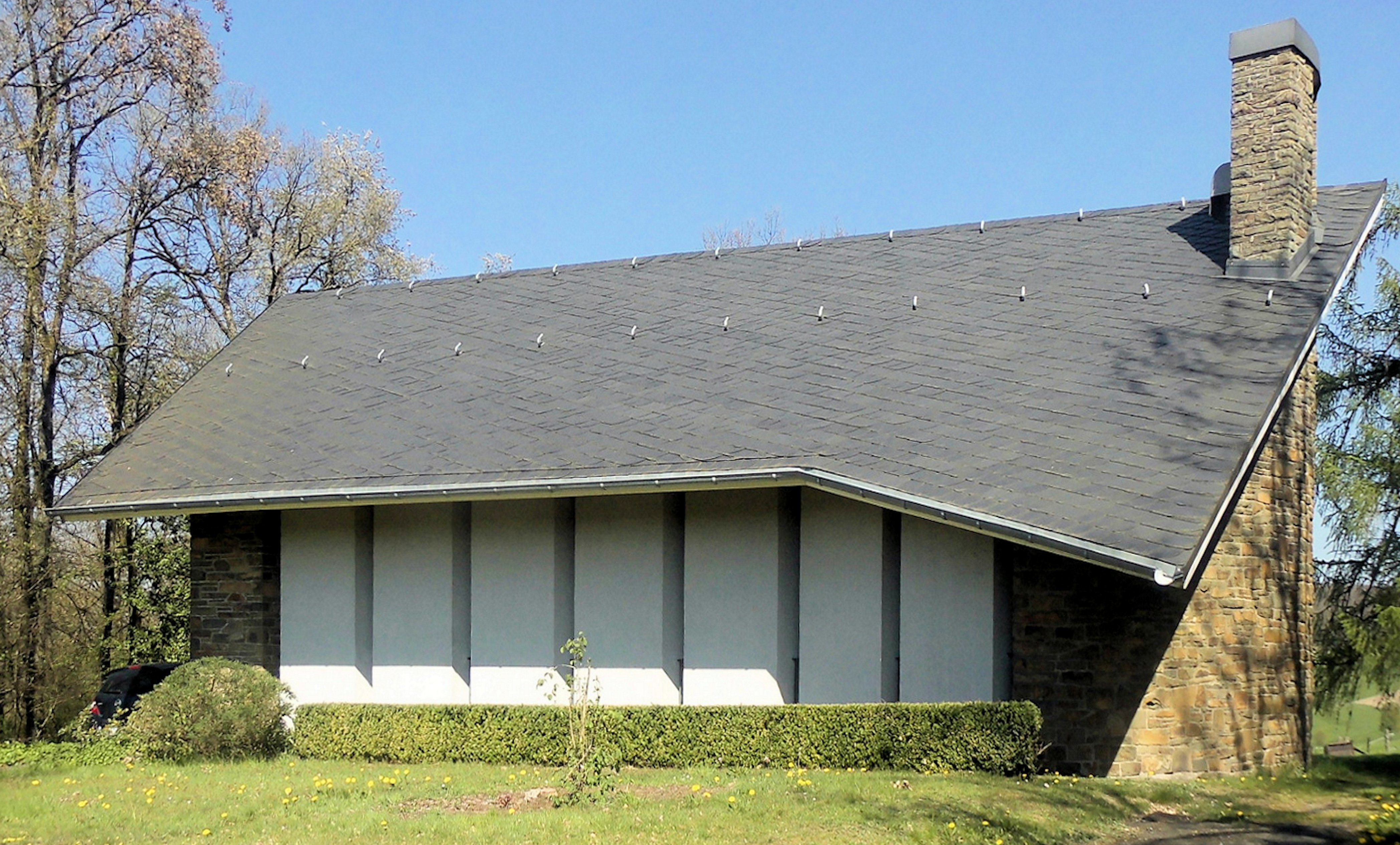 Kapelle Zur Heiligen Familie in Feld, Oberbergischer Kreis, Nordrhein-Westfalen, Deutschland